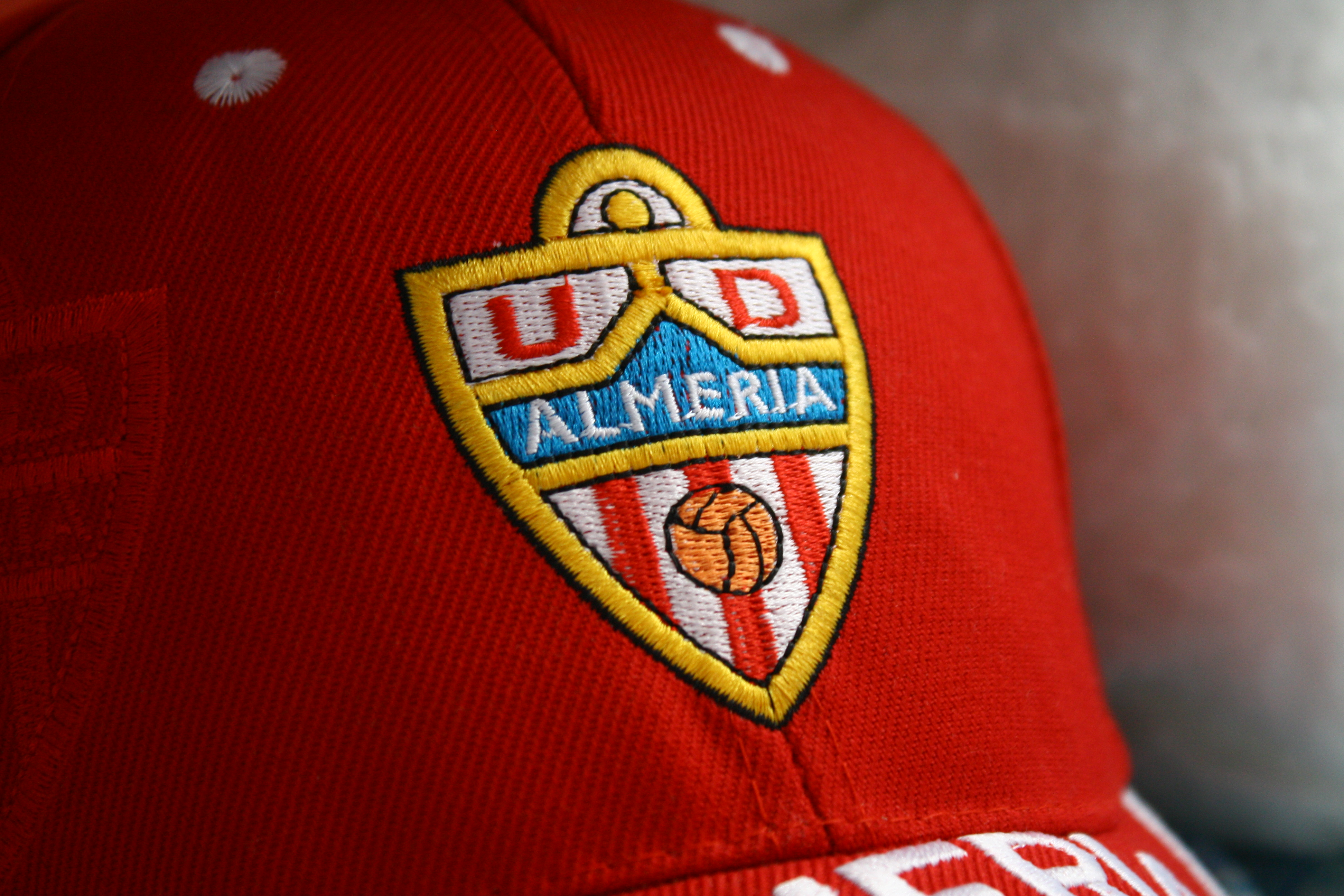 Escudo U.D. Almería bordado